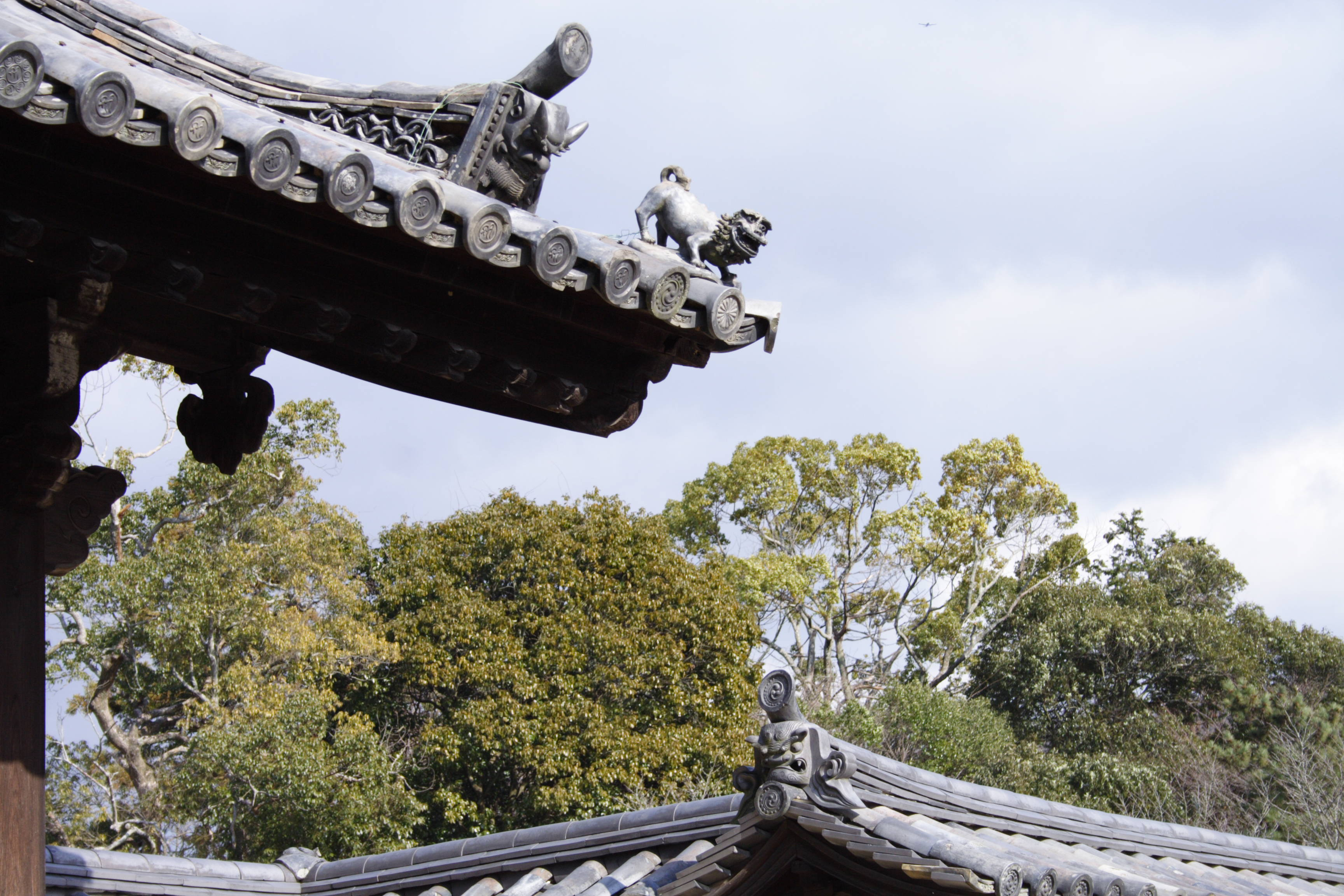 Onigawara of Kaidan-in in Todaiji/戒壇院の鬼瓦